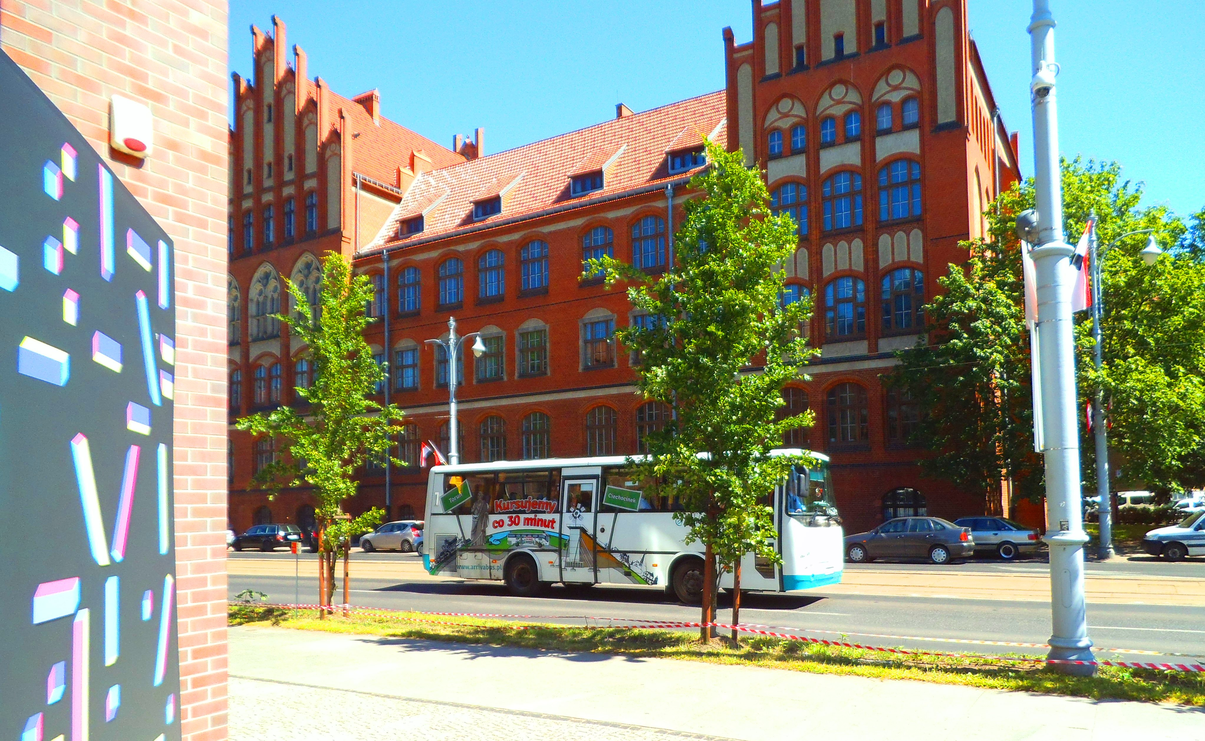 Autobus firmy Arriva Bus Transport Polska w Toruniu